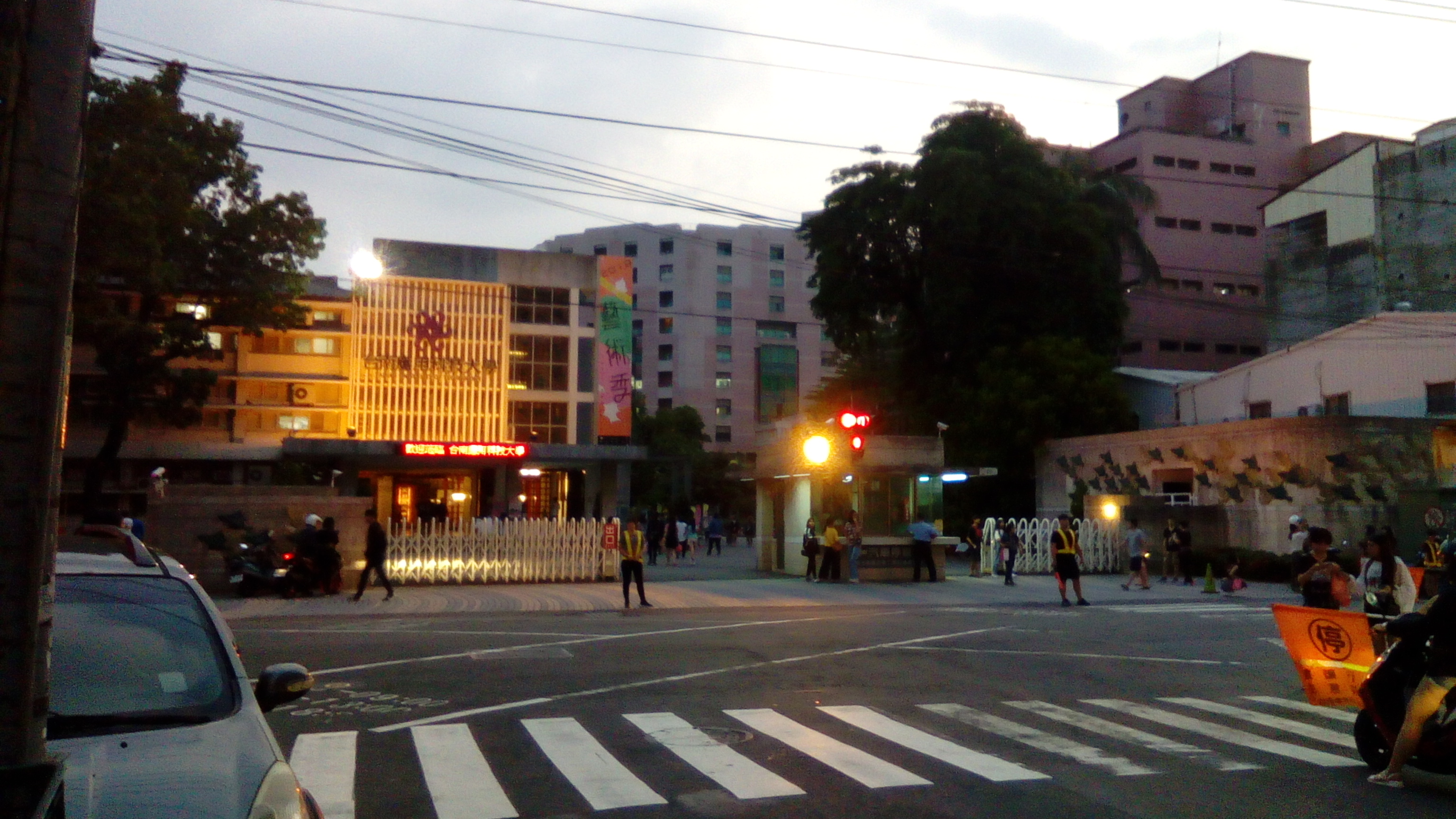 台南應用科技大學 傍晚六時許